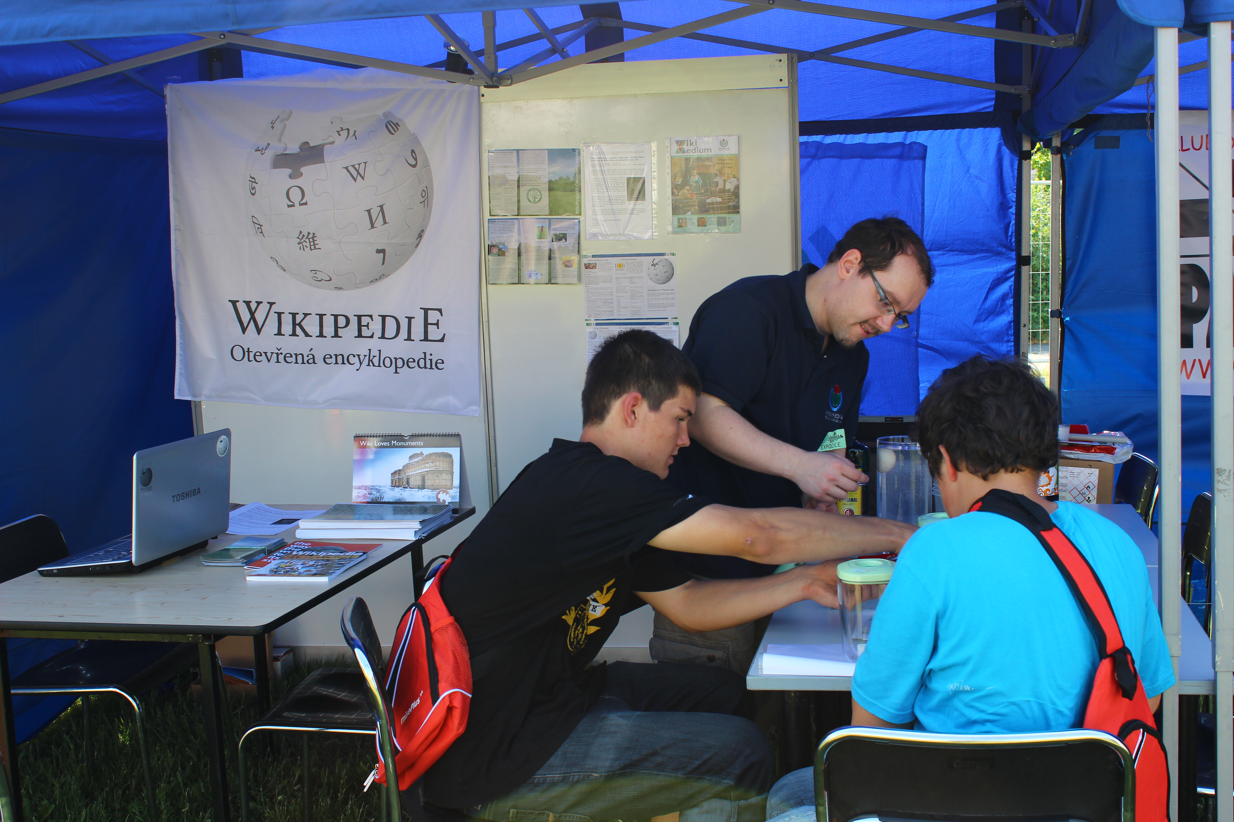 Bambiriáda je největší přehlídka činnosti sdružení, která pracují s dětmi a mládeží, a středisek volného času. Heslem ročníku 2012 bylo: Nadšení i zkušenost This photograph was taken with a DSLR from WMCZ's Camera grant.